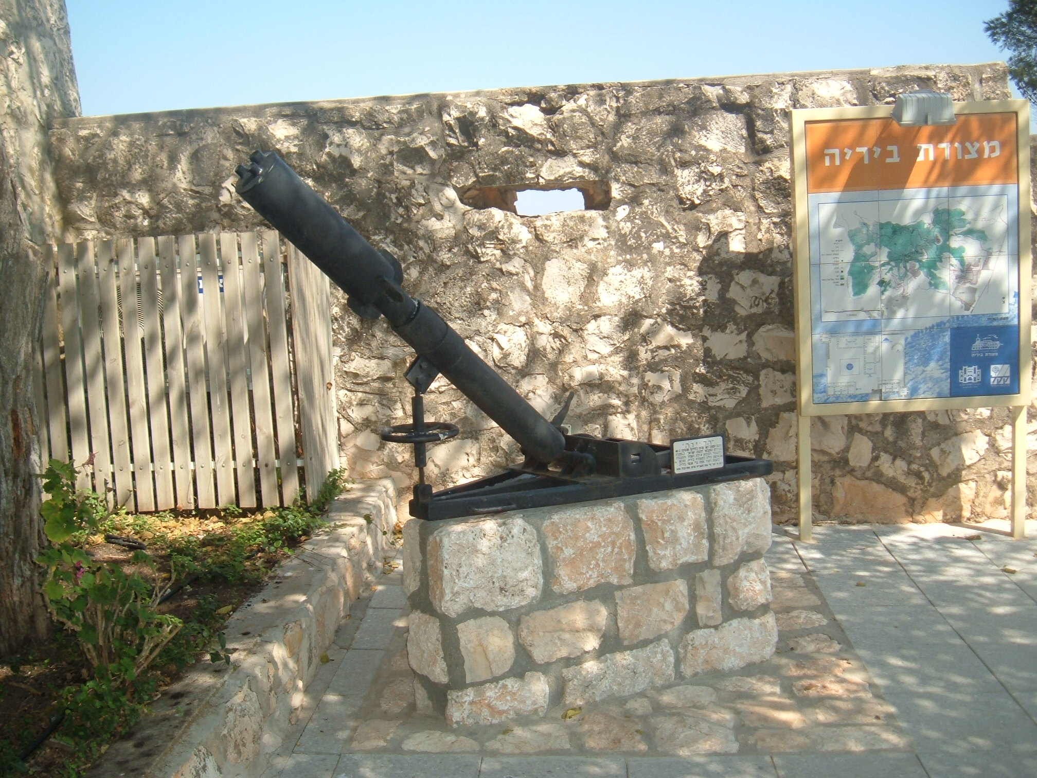 Davidka mortar displayed in Birya fortress, Israel. מרגמת הדוידקה המוצגת במצודת ביריה